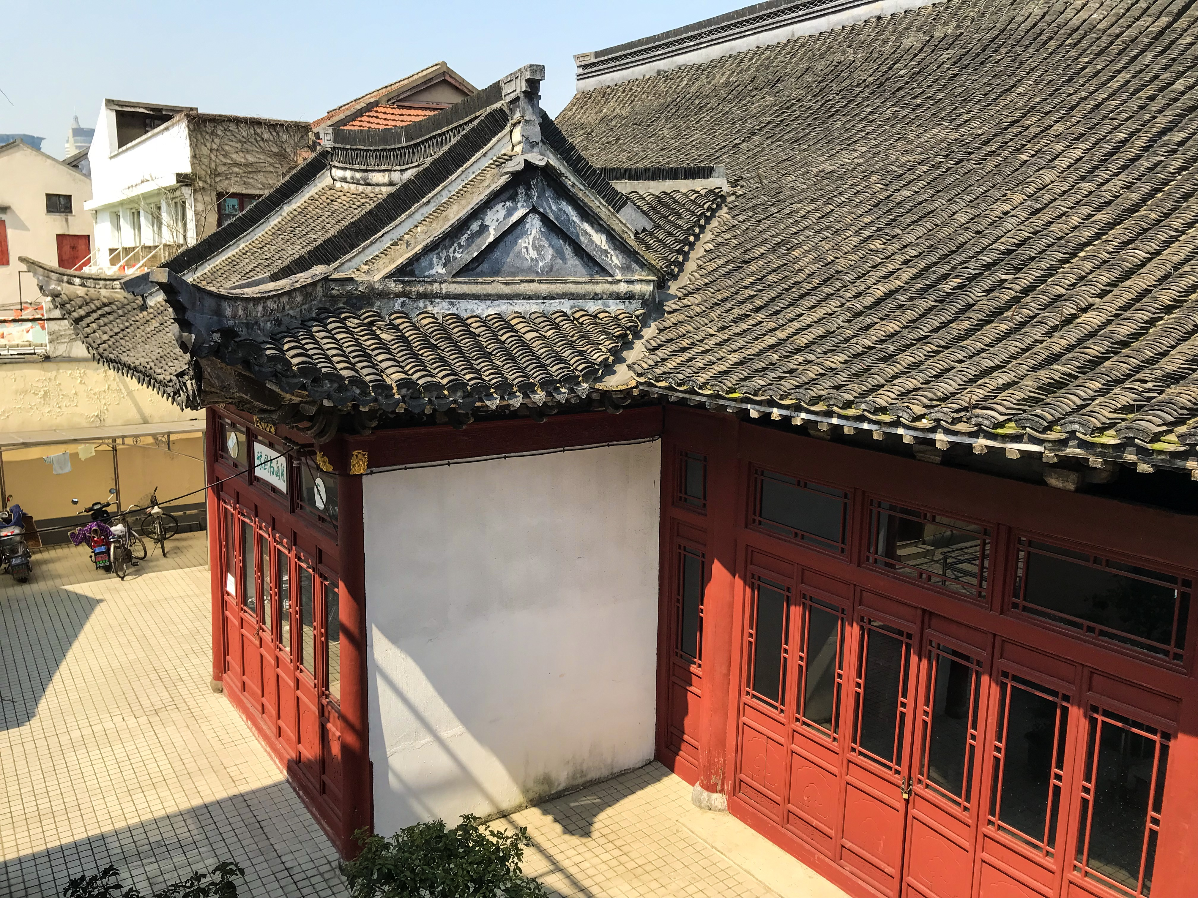 中文（中国大陆）: 世春堂 梧桐路137号 1640年